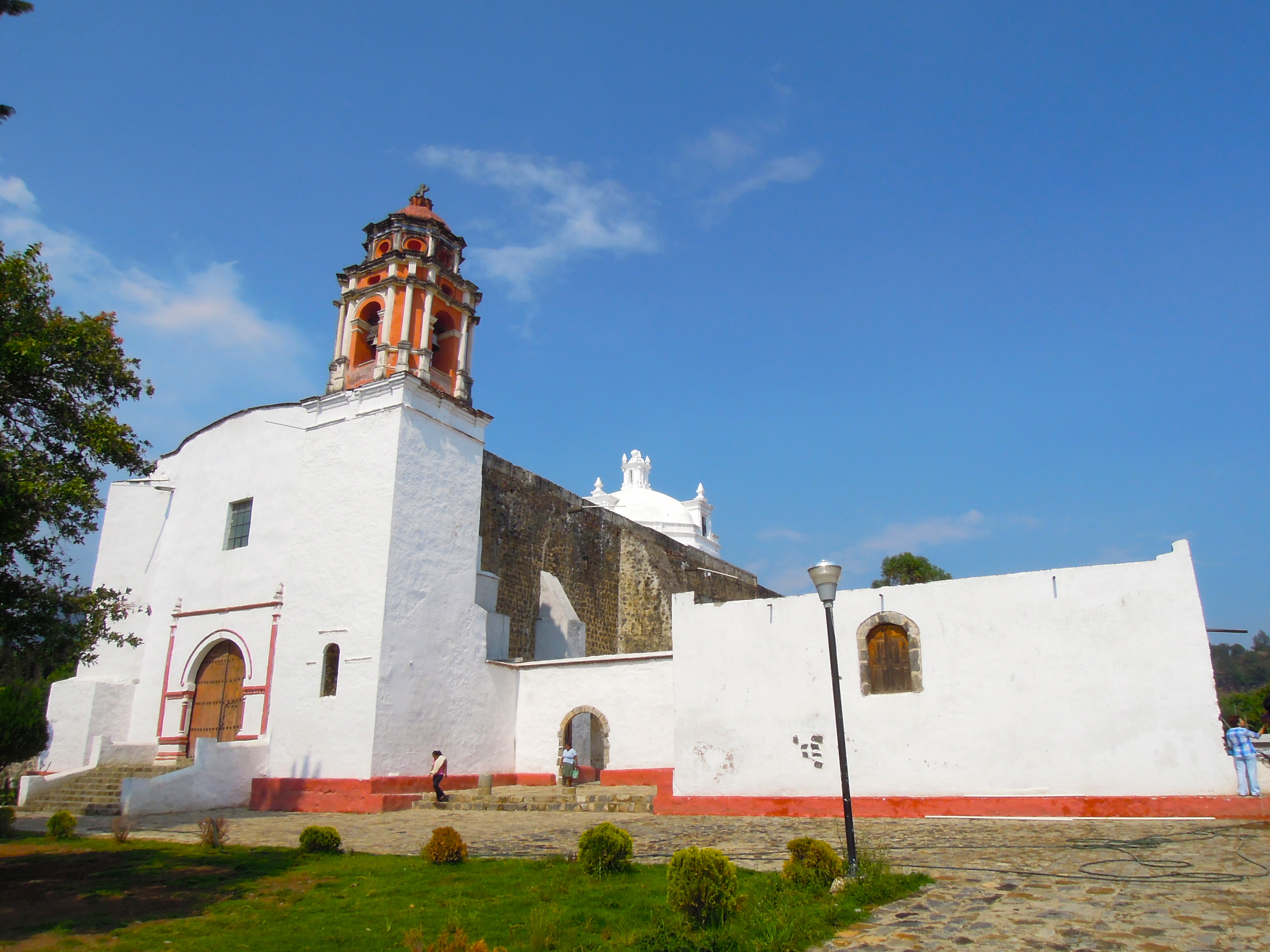 Ubicado en Hueyapan (Municipio de Tetela del Volcán), Morelos, México. De los 14 monasterios del siglo XVI en las faldas del Volcán Popocatépetl que en 1994 fueron reconocidos por la Unesco como Patrimonio de la Humanidad.